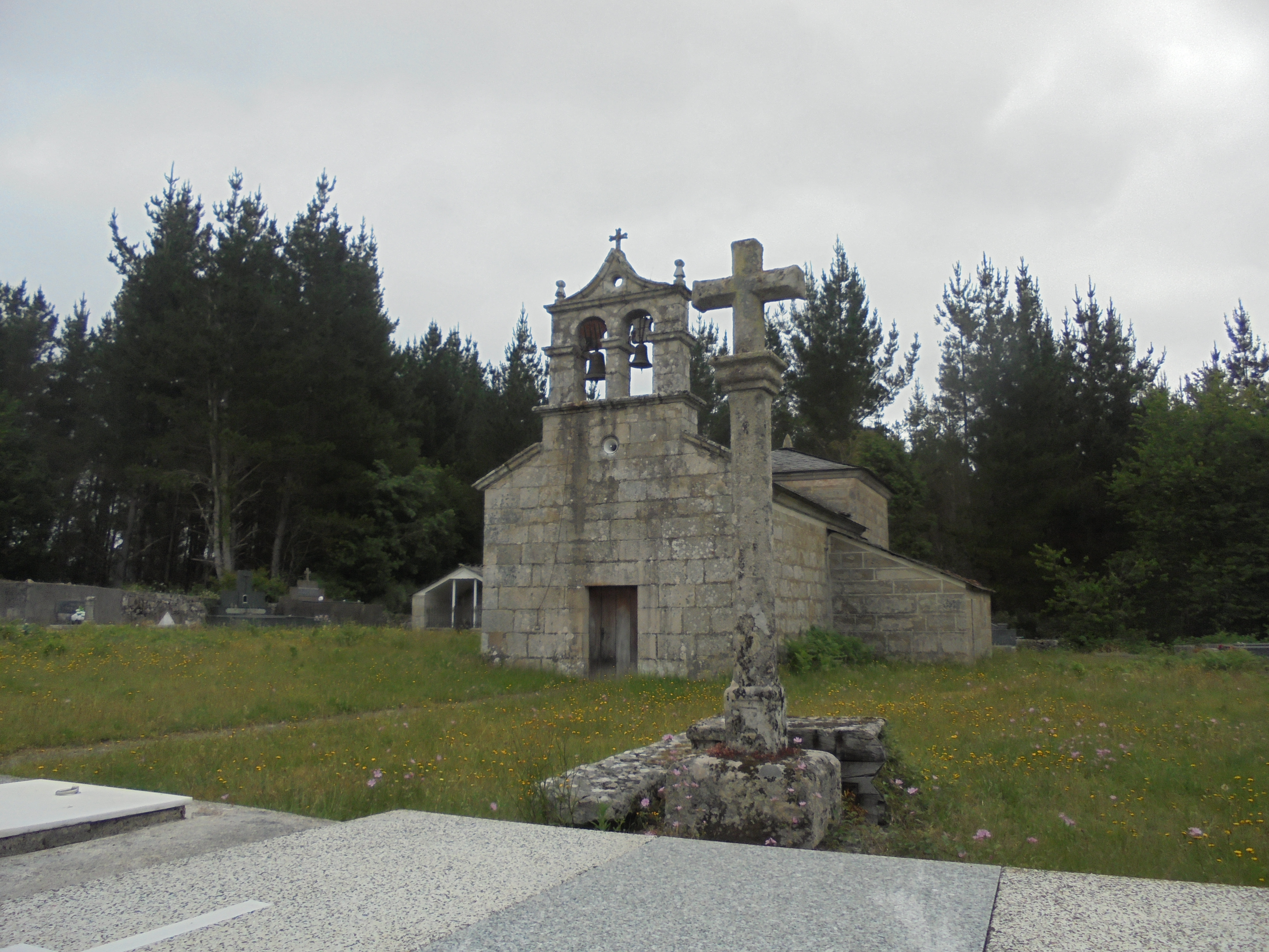 Cruceiro e igrexa parroquial de Queizán ( O Corgo)